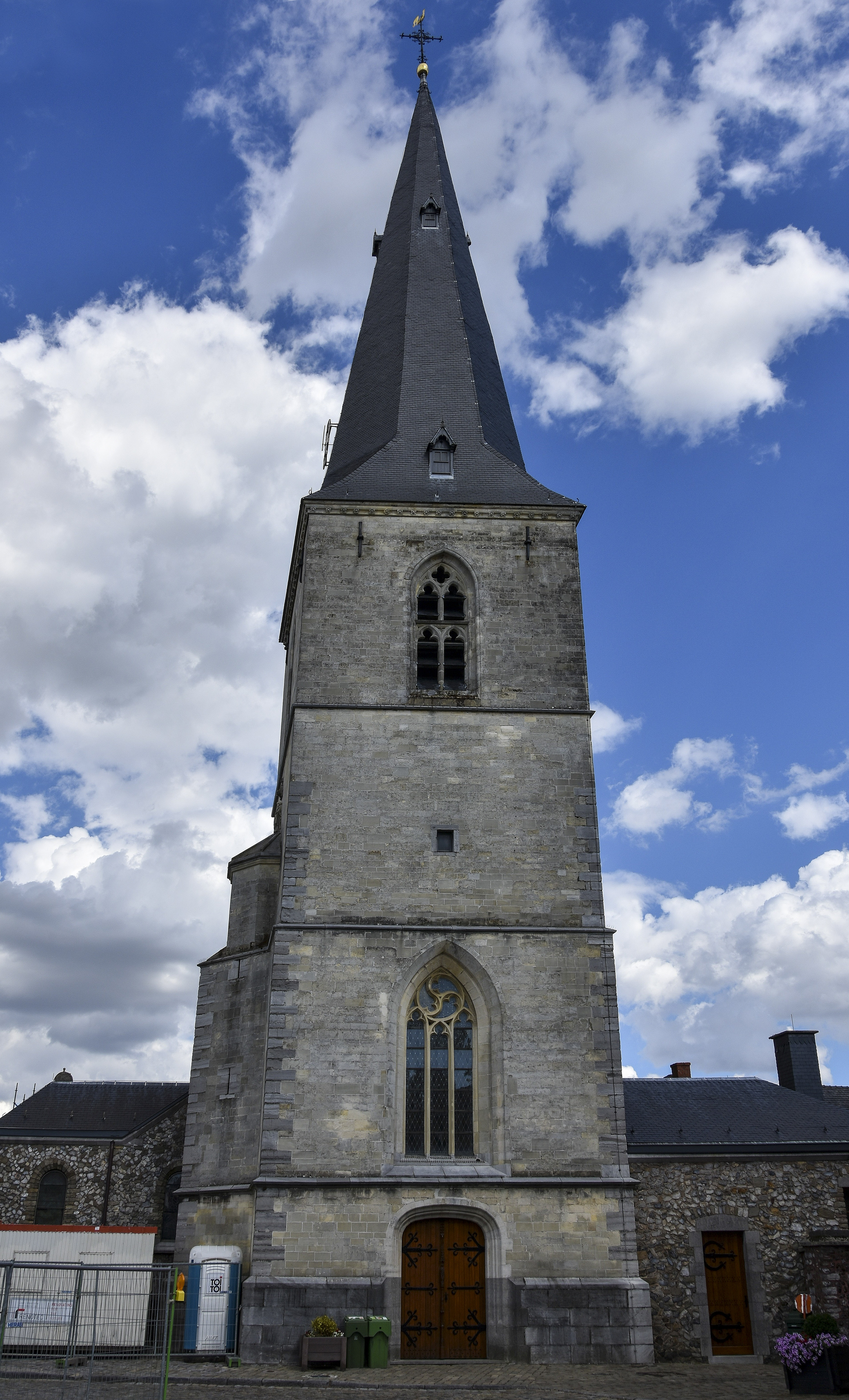 Sint-Odulphuskerk Borgloon toren 10-08-2018 This photo of immovable heritage has been taken in the Flemish Region